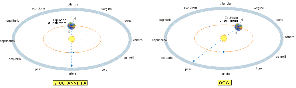 Spostamento del punto vernale all'equinozio di primavera da 2100 anni fa ad oggi.